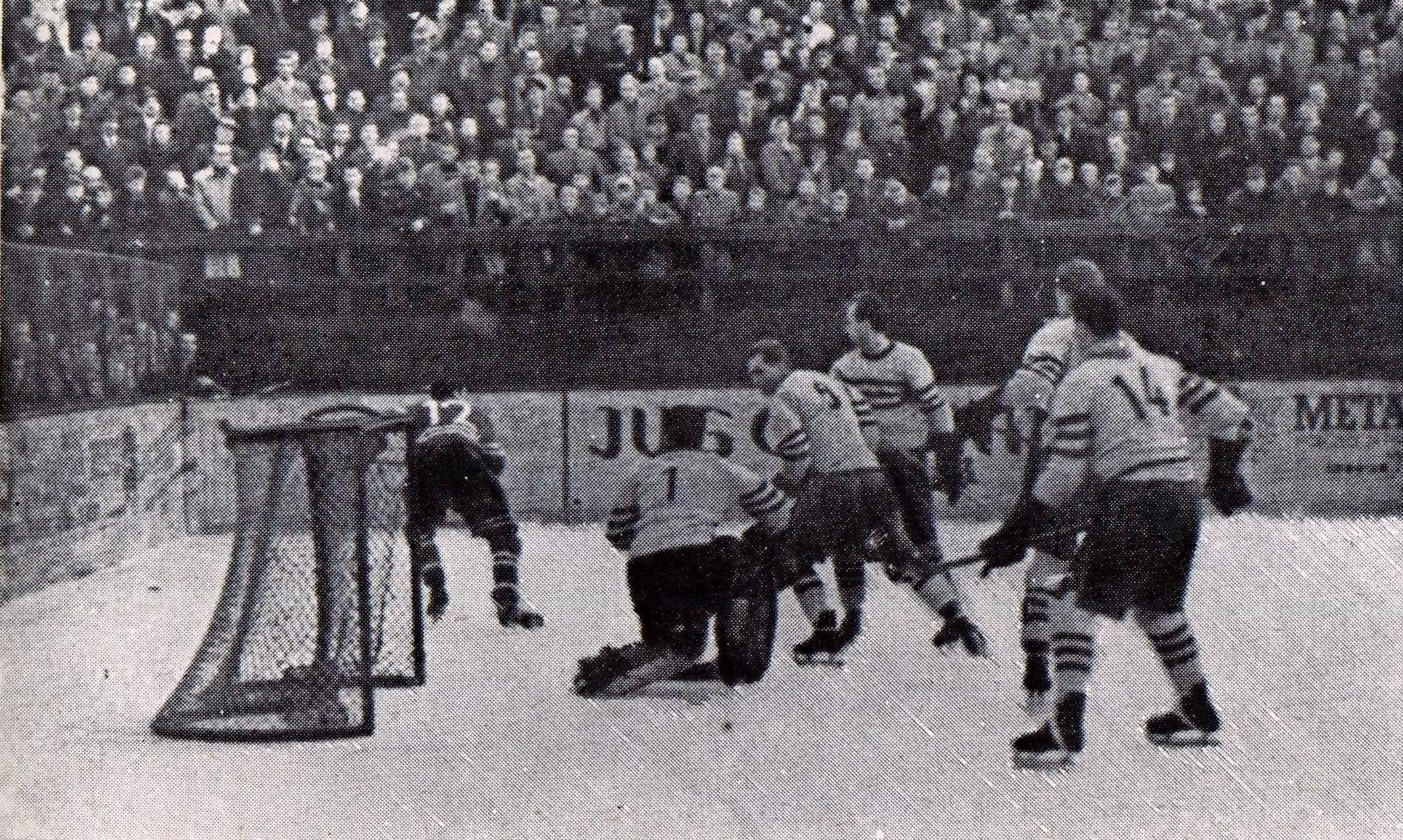 Jeseniški hokejisti so februarja 1957 osvojili prvi naslov prvakov (iz: 10 let jeseniškega hokeja (1958)).